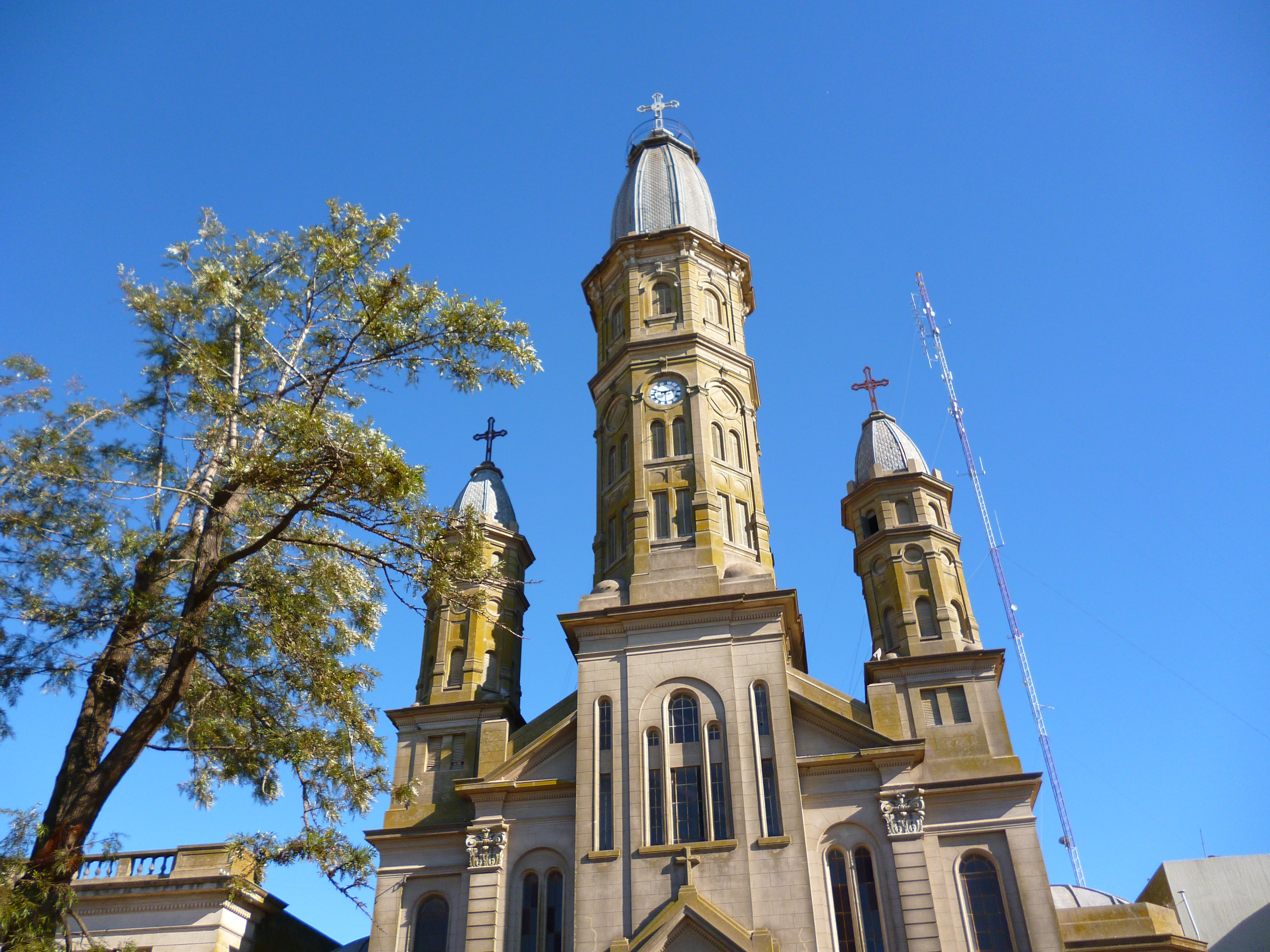 Vista de la iglesia de Nuestra Señora de la Purificación, Ayacucho, Buenos Aires, Argentina